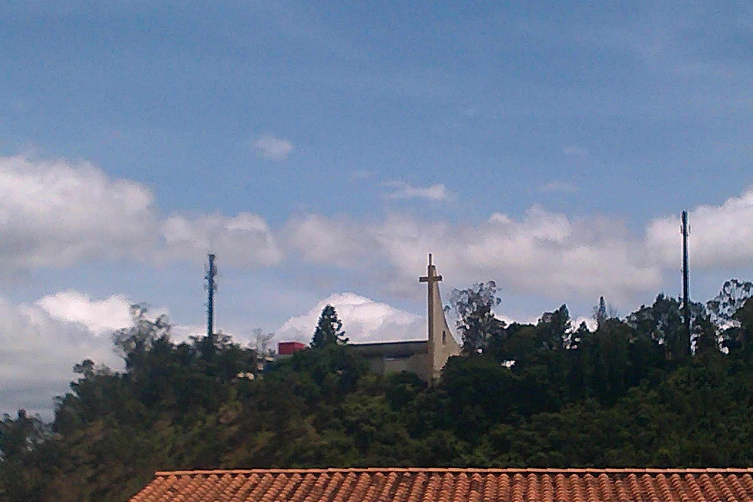 El seminario, que representa como un tiempo y un espacio geográfico, es, sobre todo, una comunidad educativa en camino: la comunidad promovida por el Obispo para ofrecer, a quien es llamado por el Señor para el servicio apostólico, la posibilidad de revivir la experiencia formativa que el Señor dedico a los Doce. Es una escuela de configuración con Cristo Sacerdote, Profeta y Pastor, donde los candidatos al ministerio irán conformando progresivamente su corazón con el corazón del Señor. El Seminario Diocesano Santo Tomás de Aquino, es la casa de formación de los futuros sacerdotes de la Diócesis de San Cristóbal. Además de su reglamento interno, el seminario diocesano se rige por el Proyecto Educativo del Seminario Diocesano Santo Tomas de Aquino (PES), debidamente aprobado por el Obispo diocesano el 12 de octubre del 2004. En dicho proyecto se asume la formación integral de los seminaristas, de acuerdo a las diversas etapas de formación.